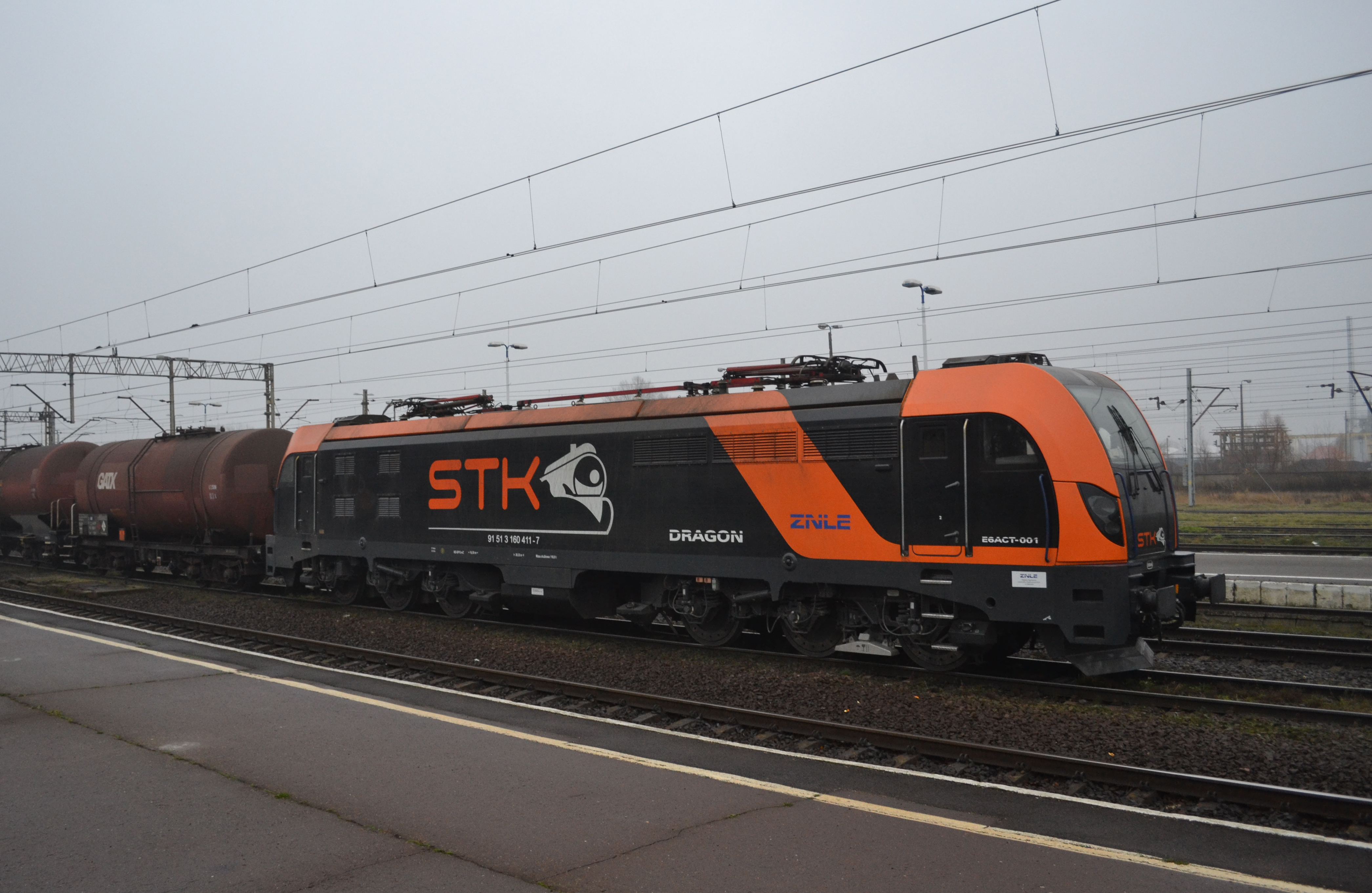 E6ACT-001 odpoczywa w Gnieźnie, wraz ze składem.